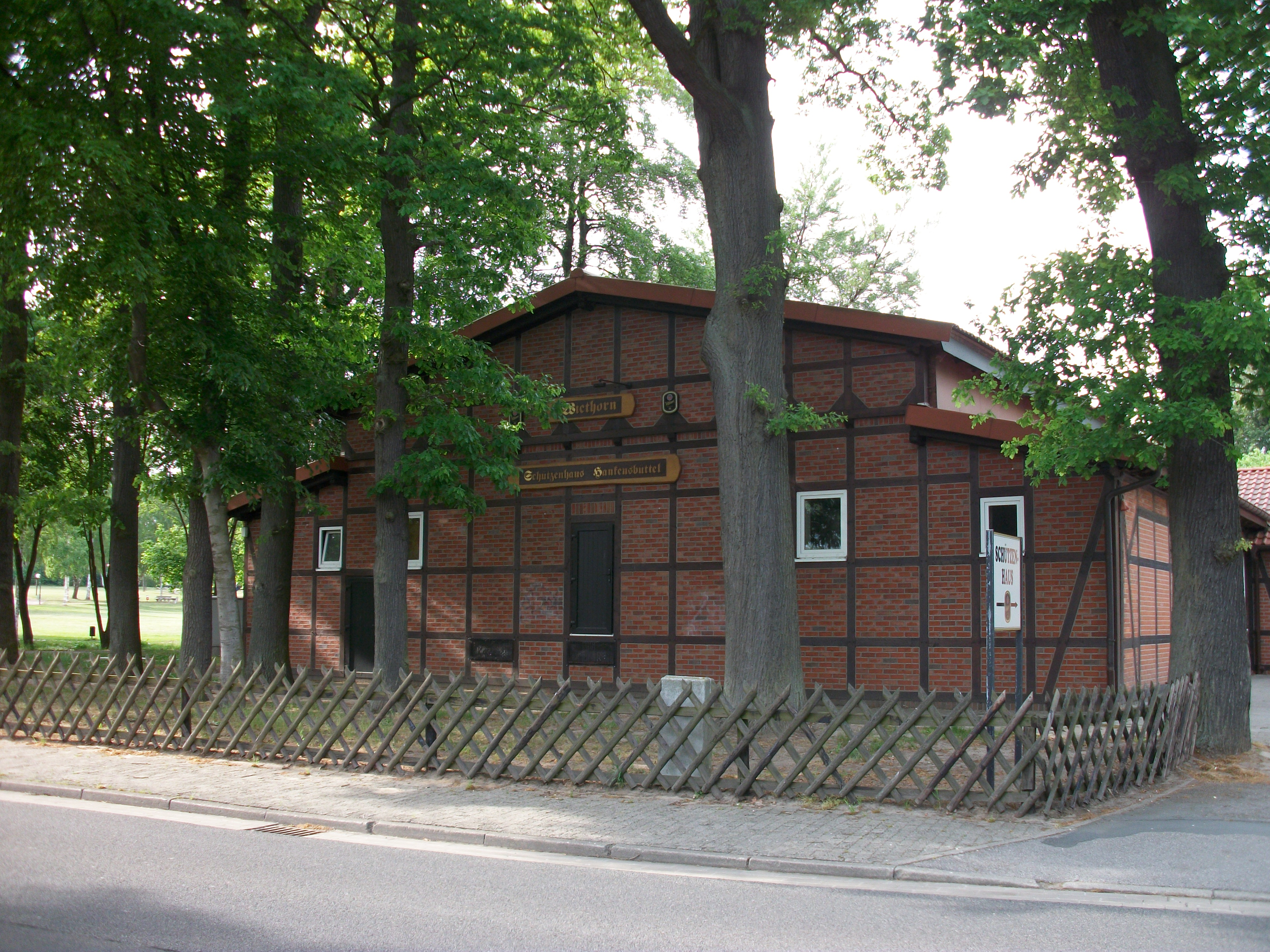 Ende des 19. Jahrhunderts errichtet, 1979/1980 aufwendig renoviert. Die Schützengesellschaft unterhält dieses Gebäude für die Gegenwart und insbesondere für die Zukunft.